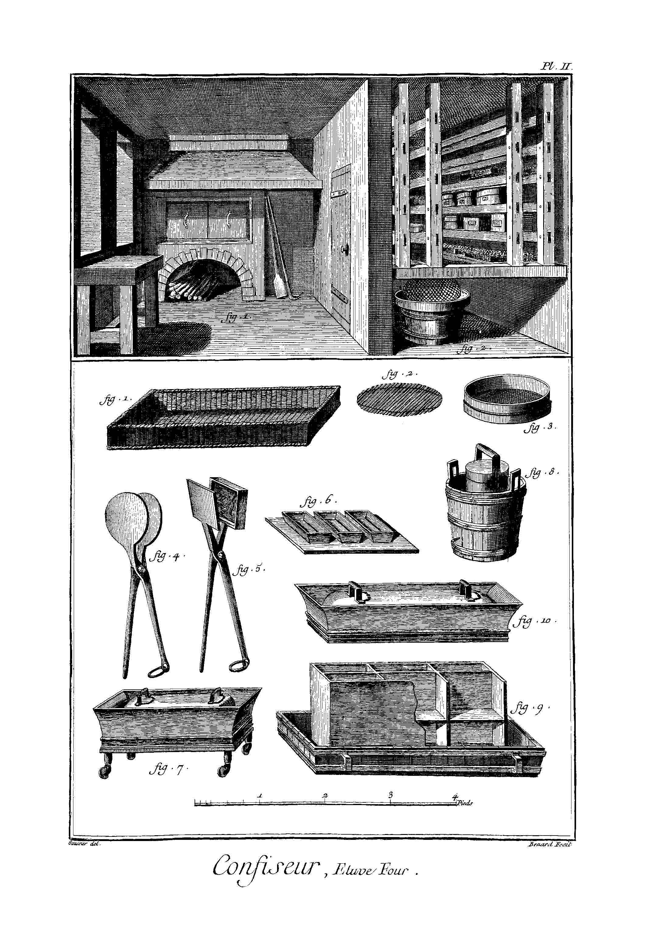 Planches de l'Encyclopédie de Diderot et d'Alembert, volume 2b.